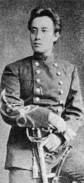 酒井忠篤の肖像写真。